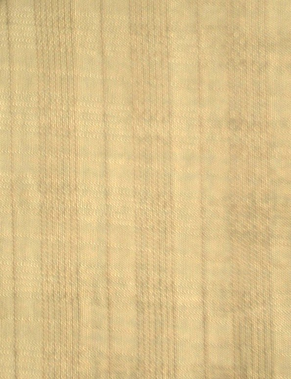 Futterstoff aus 53% Acetat und 47% Viskose